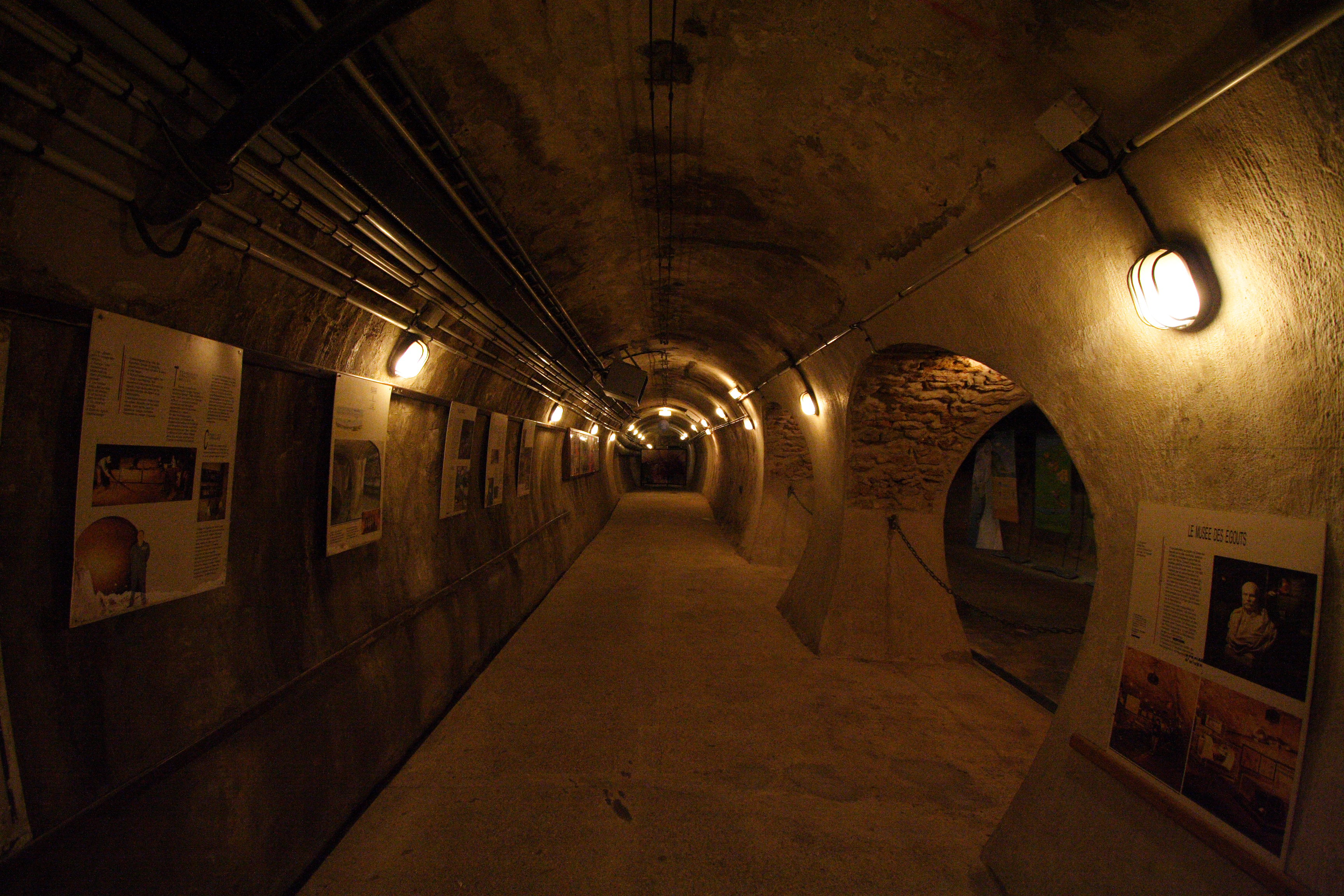 Musée des Égouts de Paris(Paris, France)